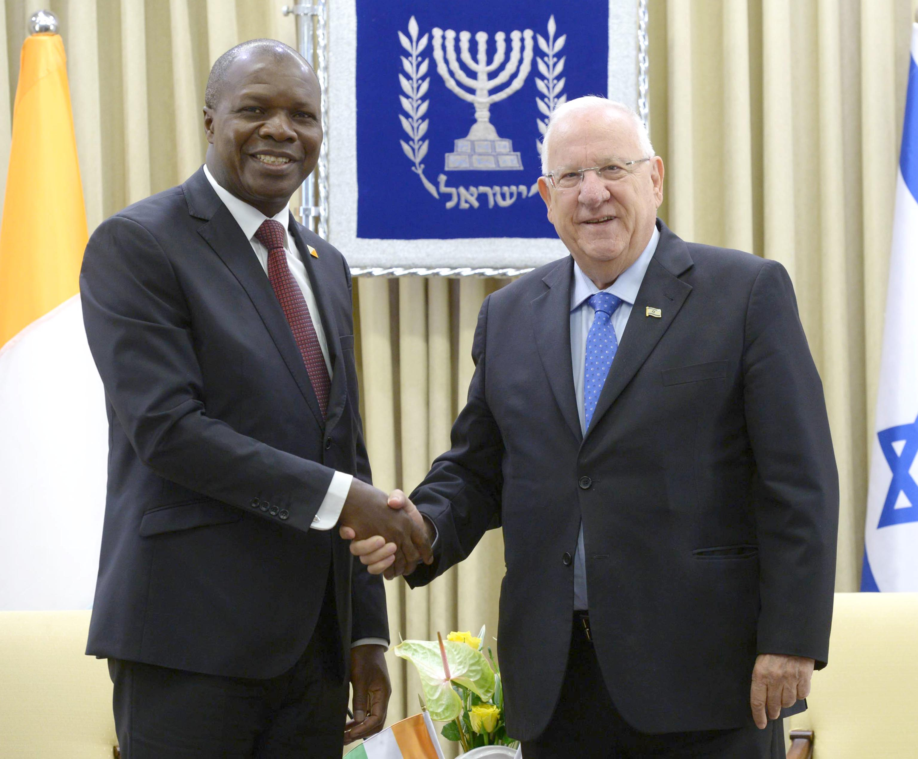 נשיא מדינת ישראל ראובן ריבלין יחד עם שר החוץ של חוף השנהב ד"ר עבדאללה אלברט טויקיוסי מברי בעת ביקורו בישראל